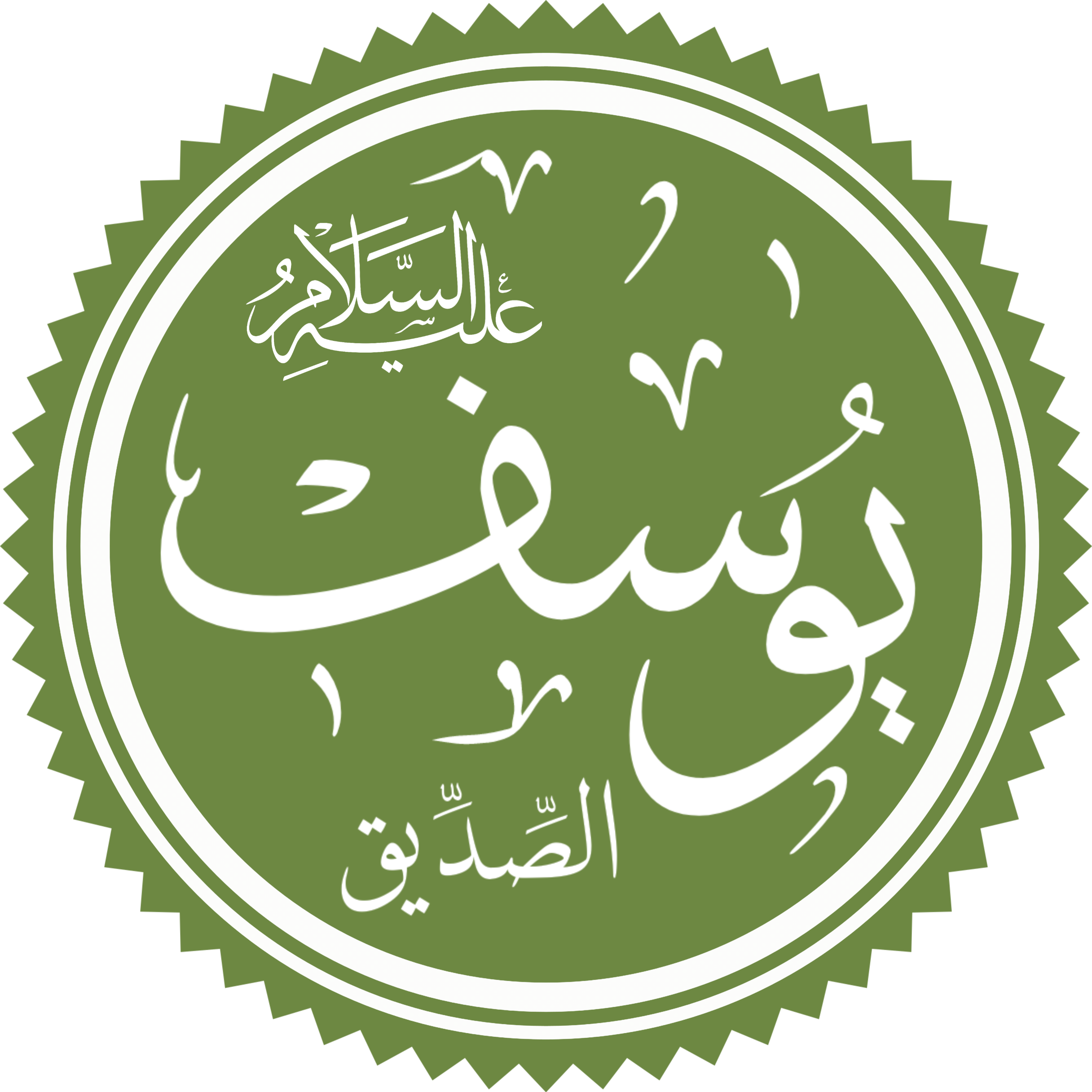 Вся права принадлежит мне, это мой файл